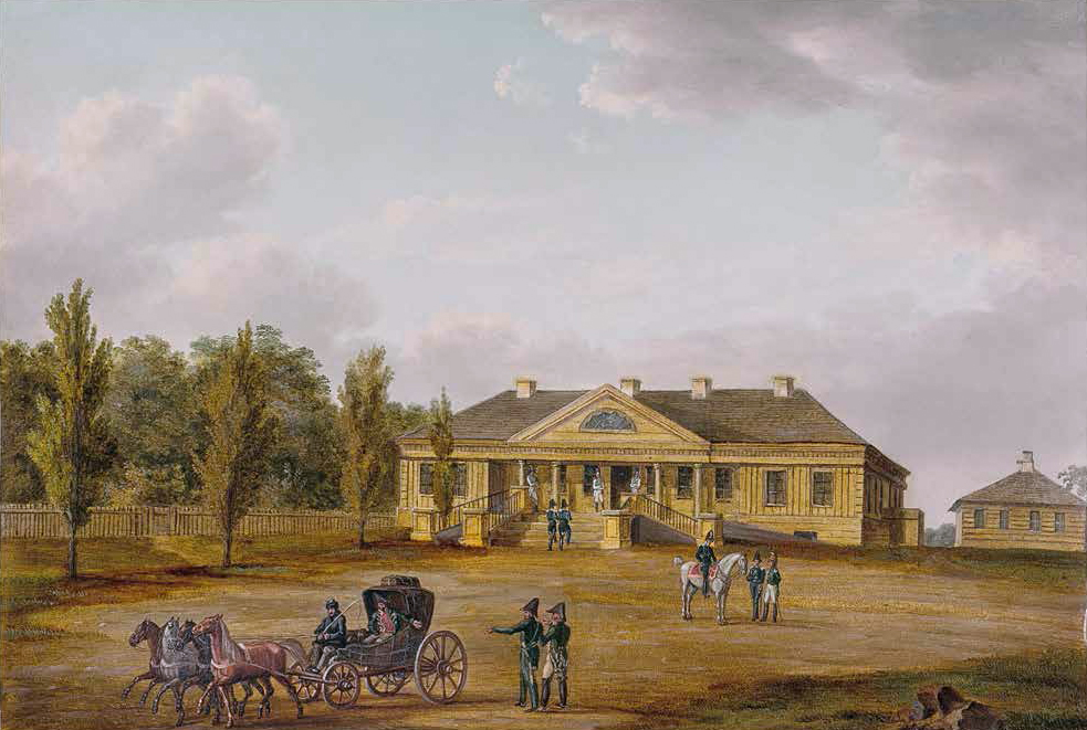 Беларуская (тарашкевіца): Смаргонь (Smarhoń), сядзіба Празьдзецкіх (Praździecki)